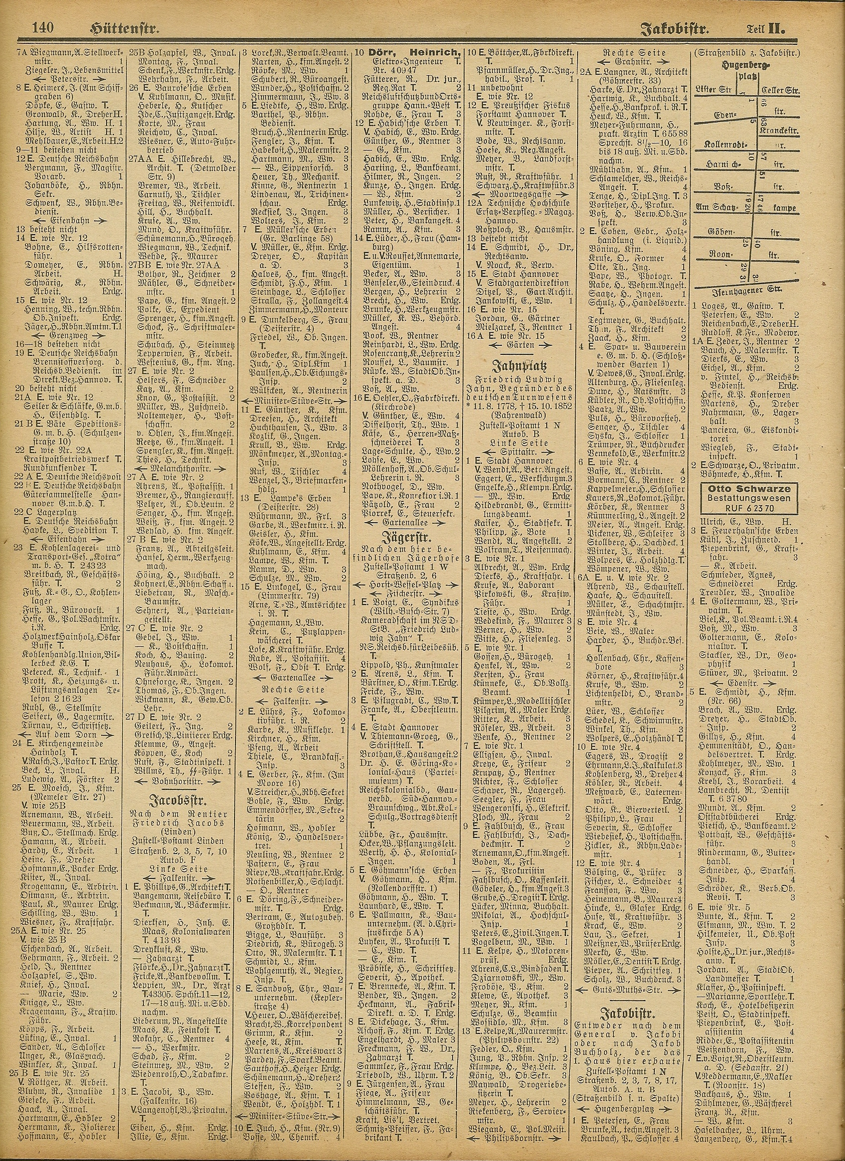 Seite aus dem Adressbuch für die Stadt Hannover 1942, Teil II, Seite 140 mit den Straßen Hüttenstraße, Jacobsstraße, Jägerstraße, Jahnplatz und Jakobistraße ...